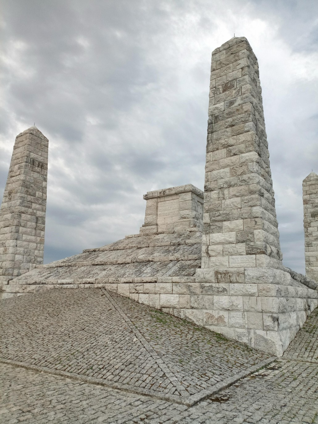 Mohyla na Bradle, místo posledního odpočinku Milana Rastislava Štefánika